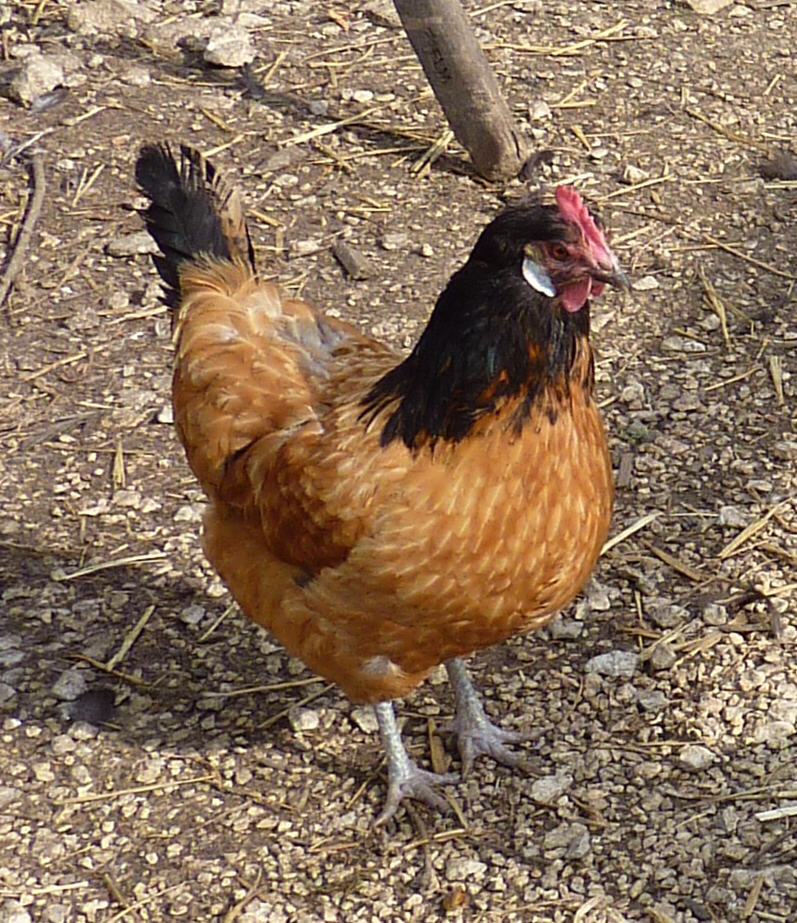 Vorwerkhuhn